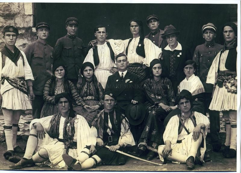 Георгиос Георгиадис